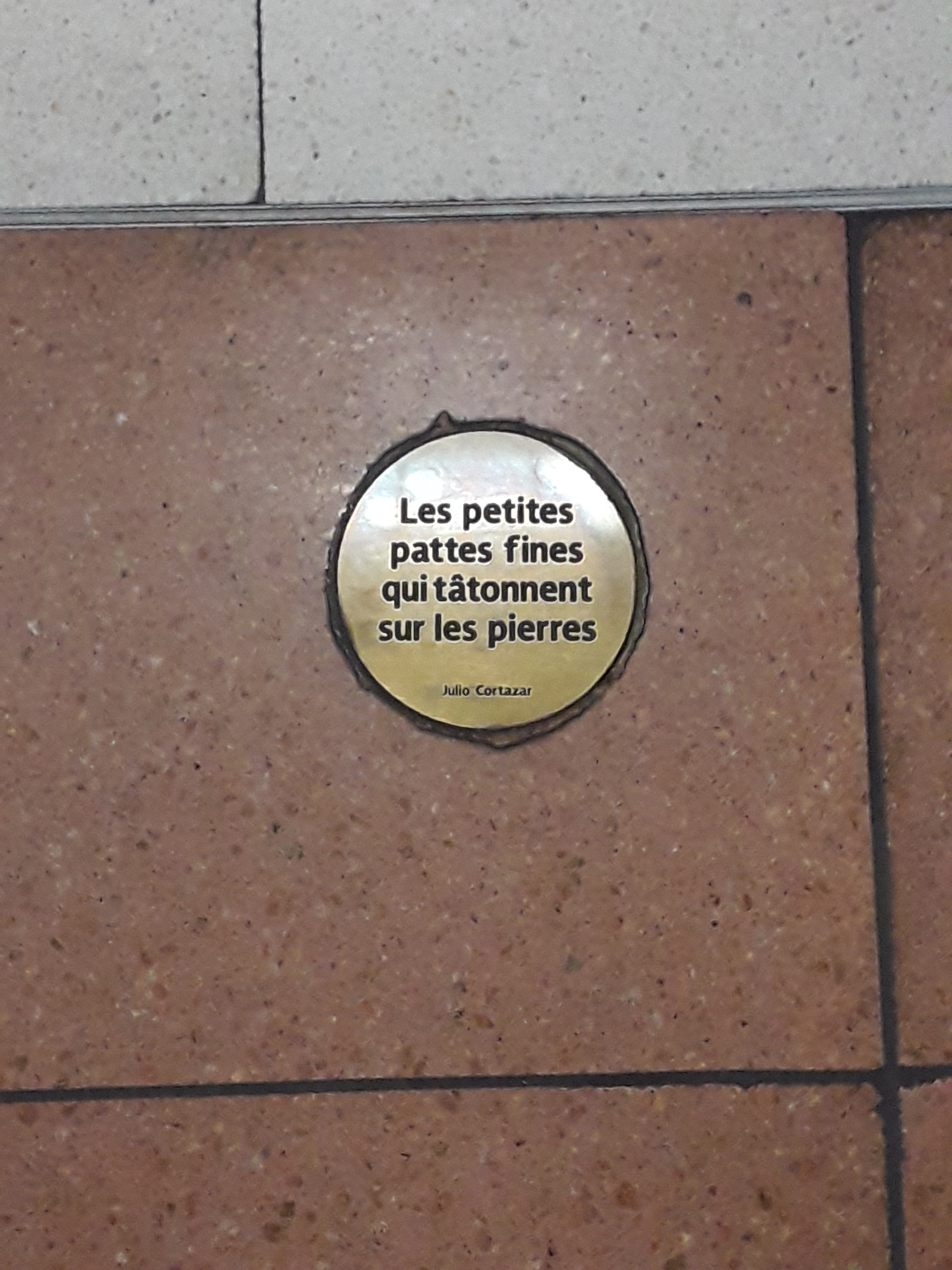 Médaillon portant une citation : Les petites pattes fines qui tâtonnent sur les pierres - Julio Cortázar, sur le quai de la station Bibliothèque François-Mitterrand dans la direction Olympiades, sur la ligne 14 du métro de Paris, en France.